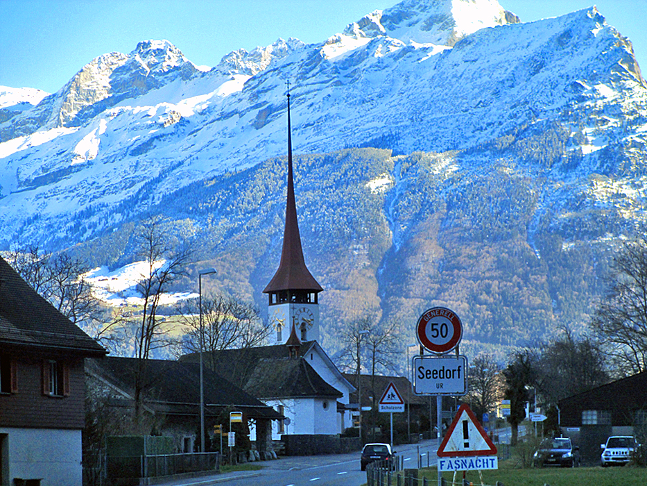 Seedorf, Kanton Uri